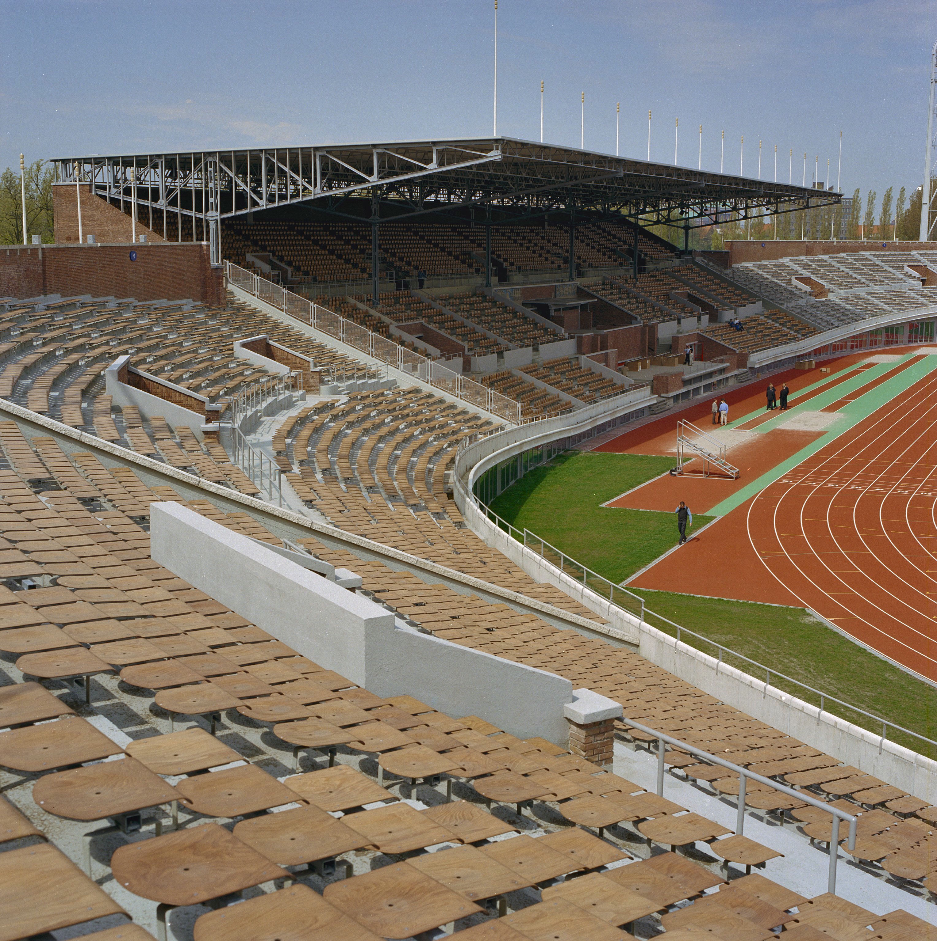 Olympisch Stadion: Interieur, gedeelte sintelbaan, tribunes, na de restauratie